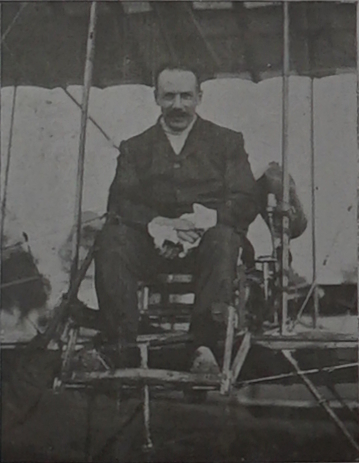 le pilote Cockburn